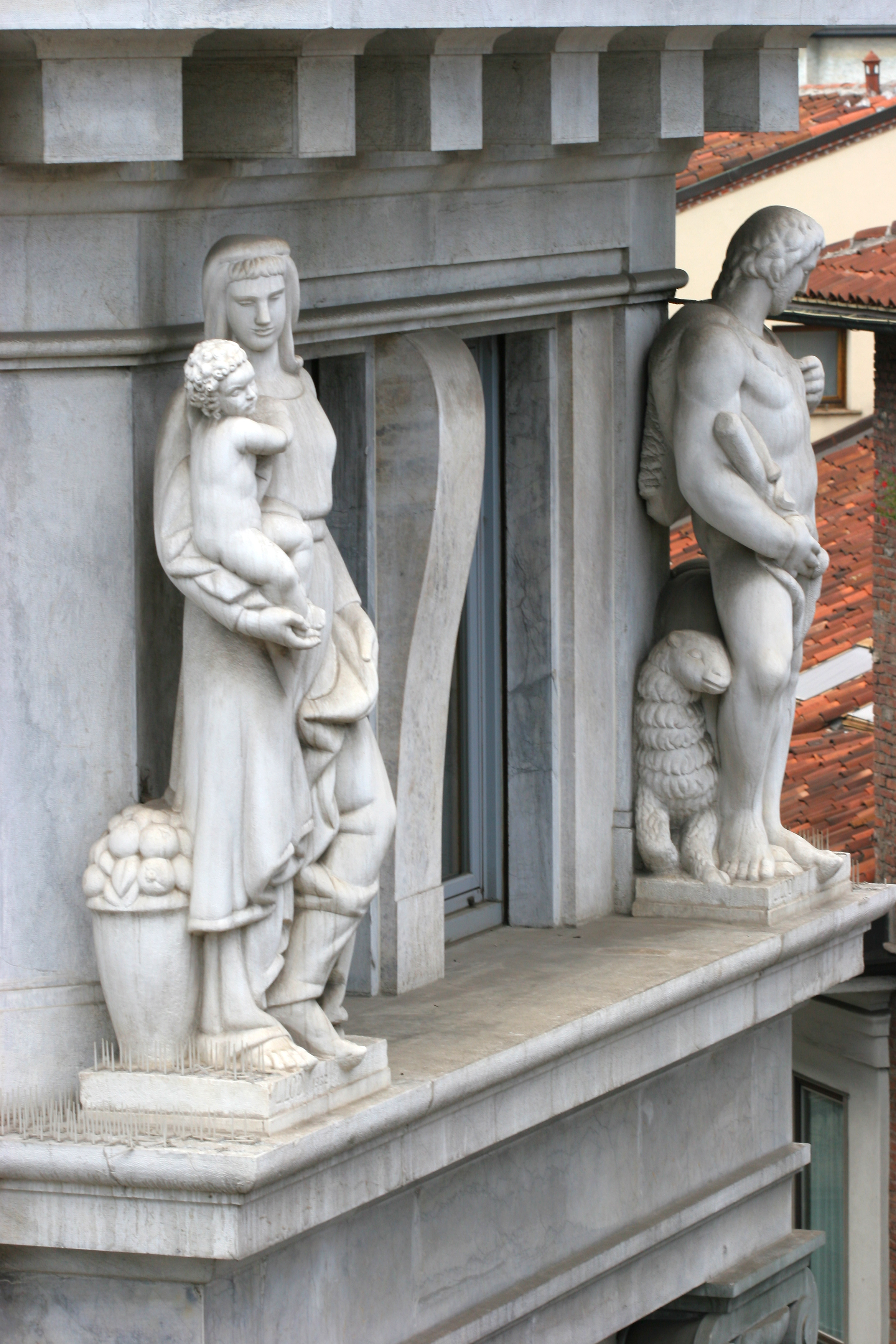 Le due statue dello scultore Leone Lodi che ornano il tetto del palazzo di Via Santa Maria Segreta, 9 a milano, realizzate nel 1932